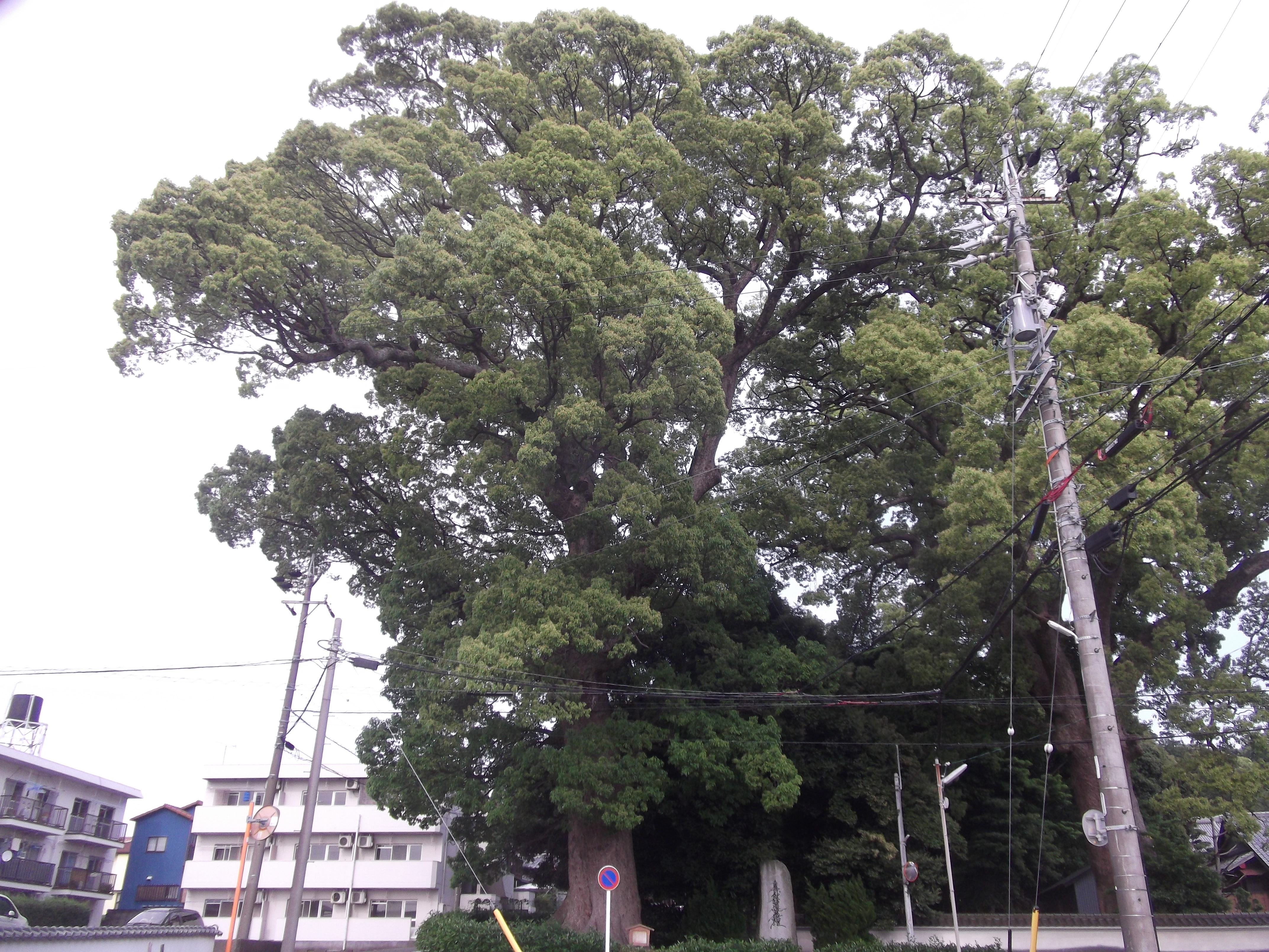 静岡市駿河区の本覚寺の大クス。